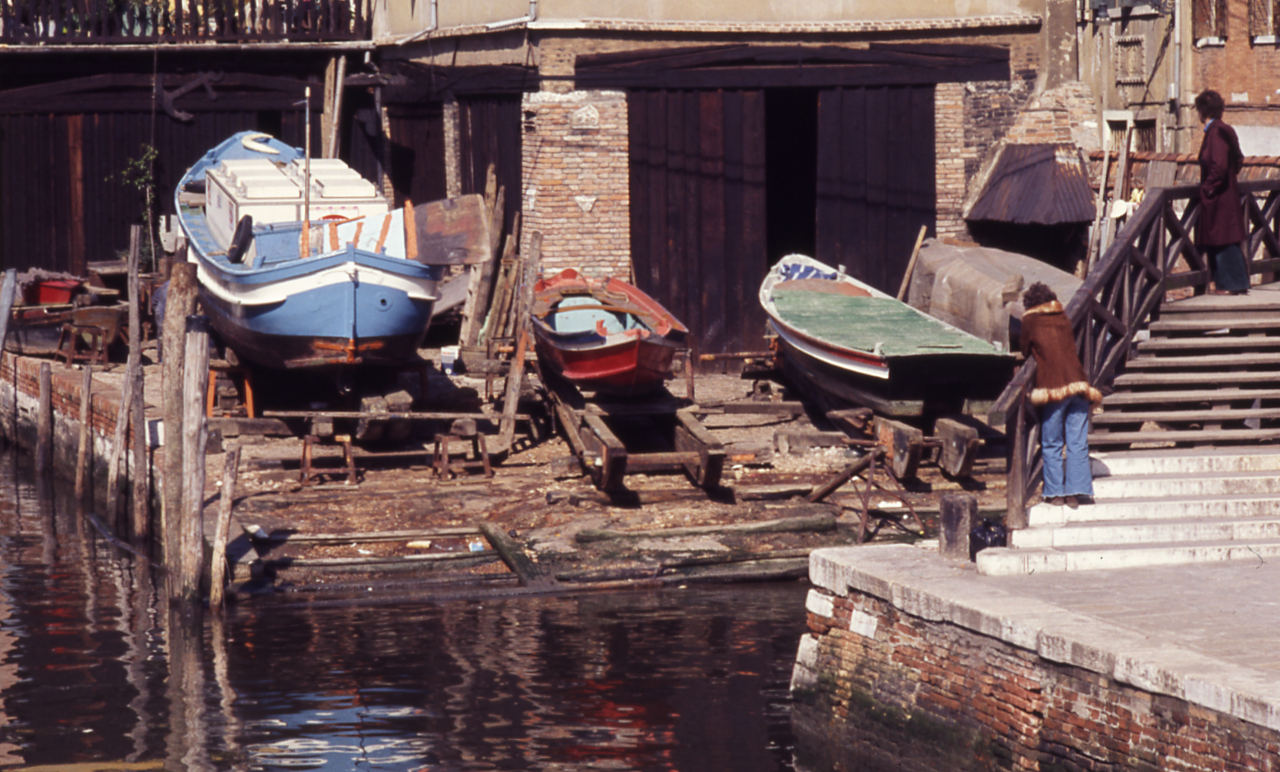 Servizio fotografico : Venezia, 1982 / Paolo Monti. - Foglio: 1, Fotogrammi complessivi: 20/20 : Diapositiva, sviluppo cromogeno/ pellicola ; 35 mm. - ((Fonte: Rubrica di Paolo Monti: Diapositive 24x36mm (1948-1982), presso Archivio Paolo Monti. Rubrica con elenco soggetti e numeri di inventario (da 1 a 1000) corrispondenti ai fogli a tasche in pvc in cui sono contenute le diapositive.